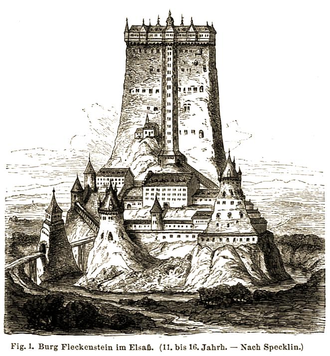 Burg Fleckenstein, Rekonstruktion nach Specklin. Ausschnitt der Tafel „Burgen“ in Meyers Konversationslexikon.